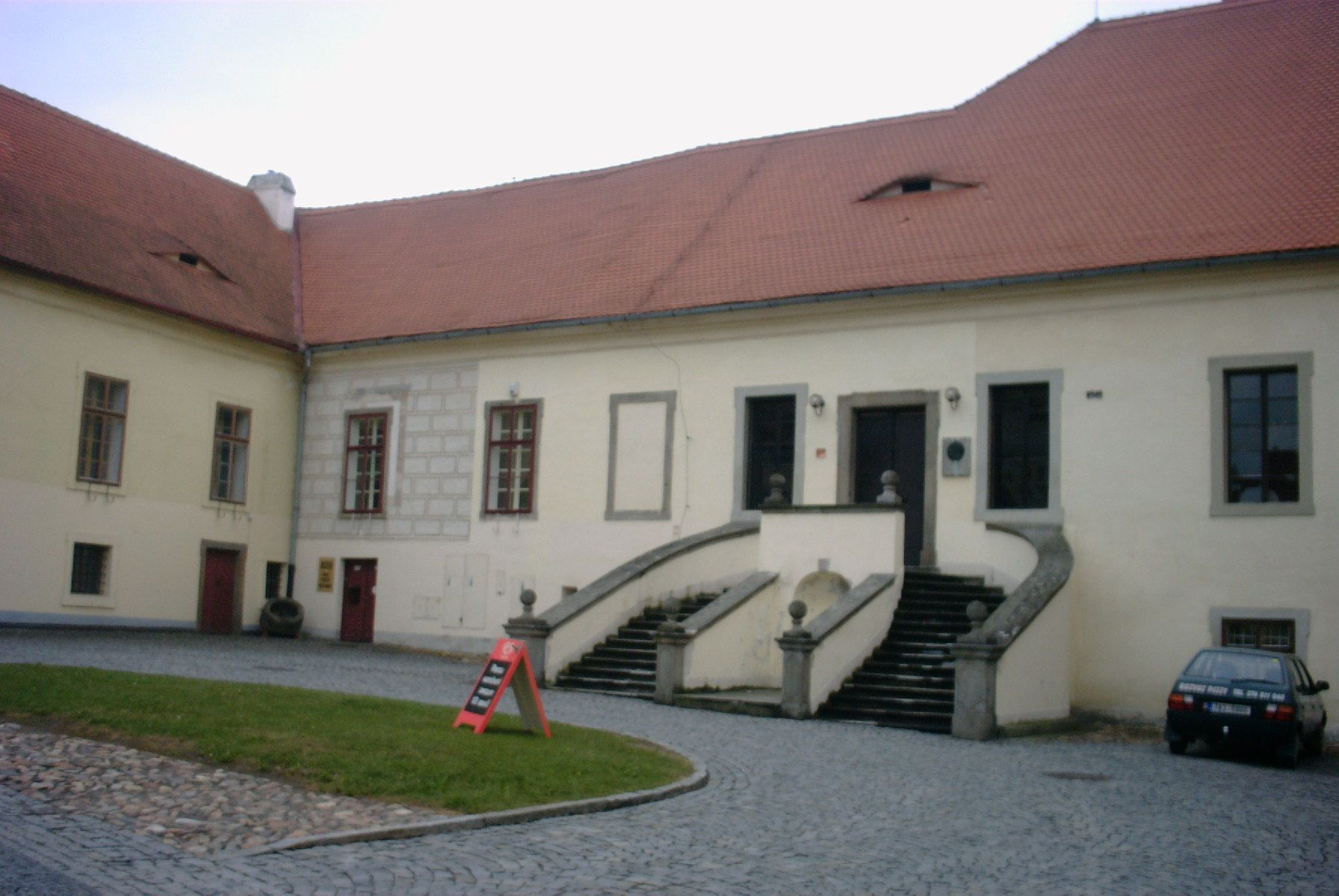 Horažďovice - zámek